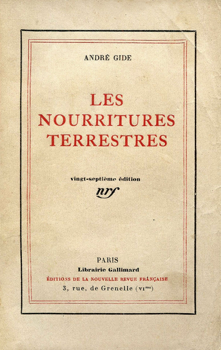 Les Nourritures terrestres d'André Gide. Couverture éditions Gallimard 1925. Titre anglais The Fruits of the Earth.